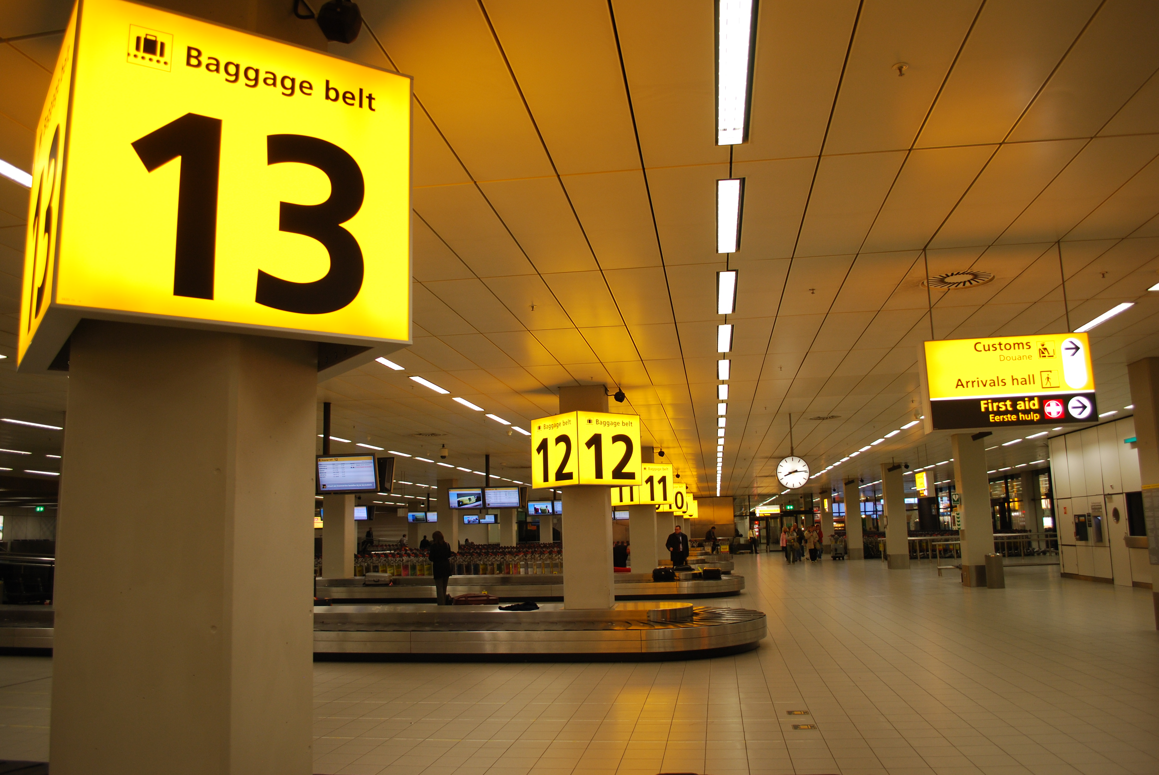 Sala de equipajes del aeropuerto de Schiphol (Amsterdam) donde se aprecian los elementos de señalización diseñados por Paul Mijksenaar